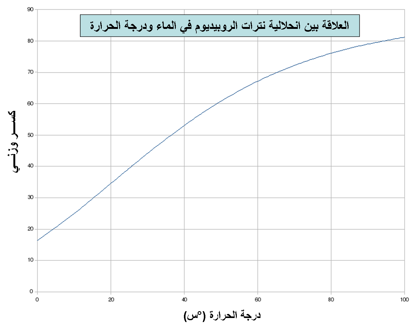 Solubilité de RbNO3 dans l'eau en fonction de la température.